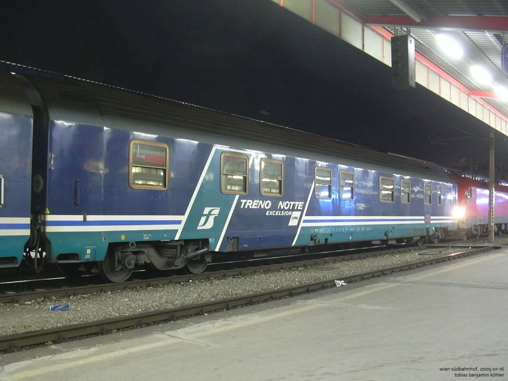 Moderner italienischer Schlafwagen WLABm 61 83 78-90 010-3 "Treno Notte Excelsior" in Wien Südbahnhof, 2005-01-16.